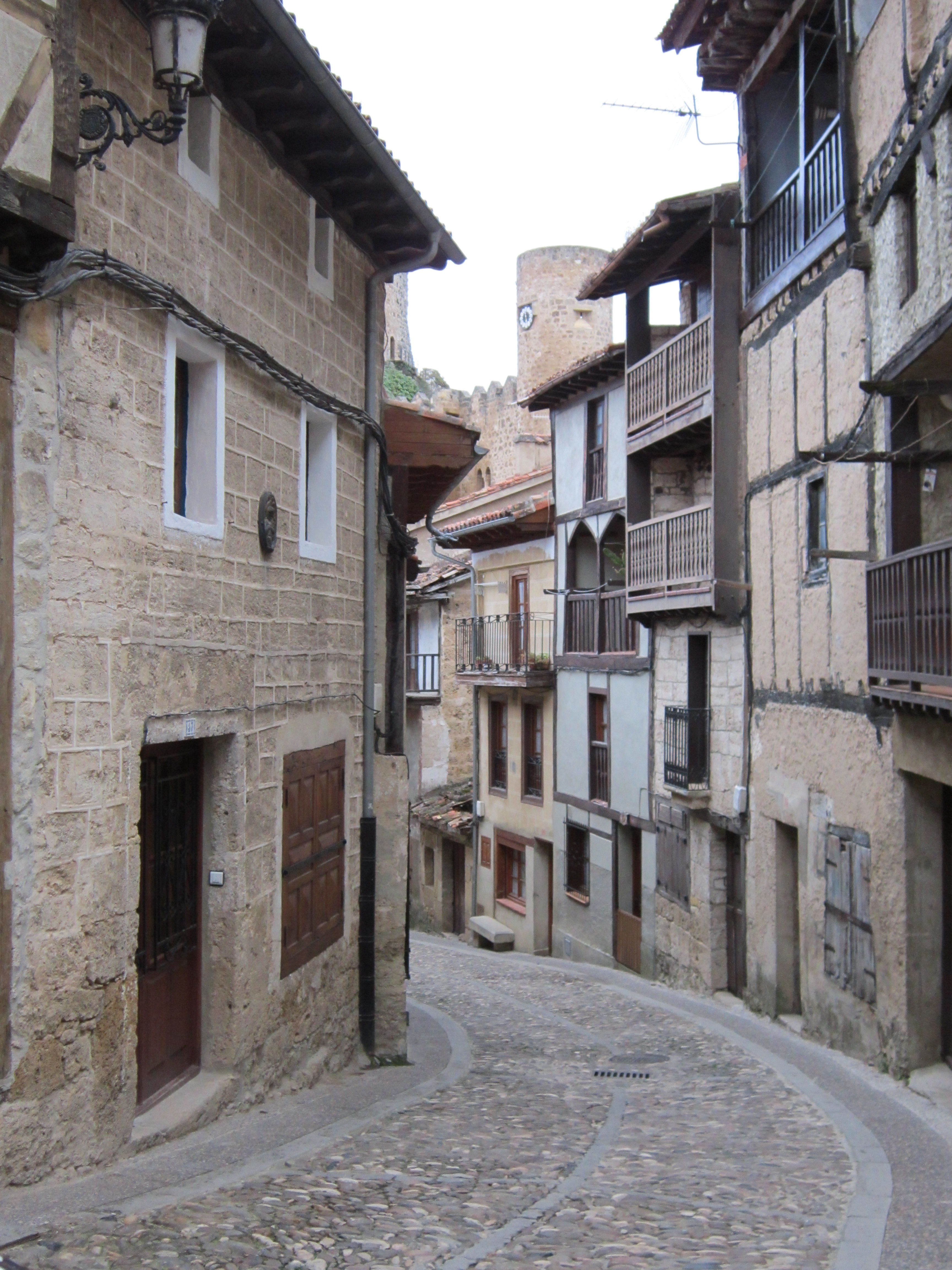 Arquitectura Popular